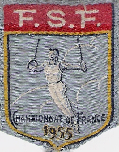 Écusson personnel du championnat de gymnastique de 1955 à Saint-Étienne